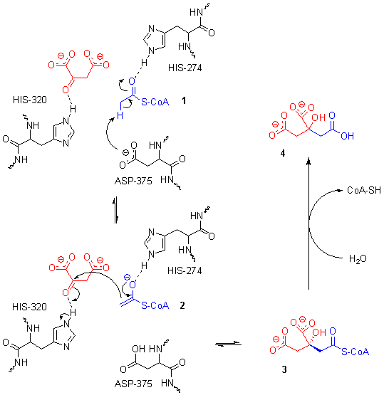 Summary Bildbeschreibung: Mechanismus der Citratbildung durch die Citratsynthase. Quelle: selbst gezeichnet Fotograf/Zeichner: Minutemen Datum: 26. April 2006